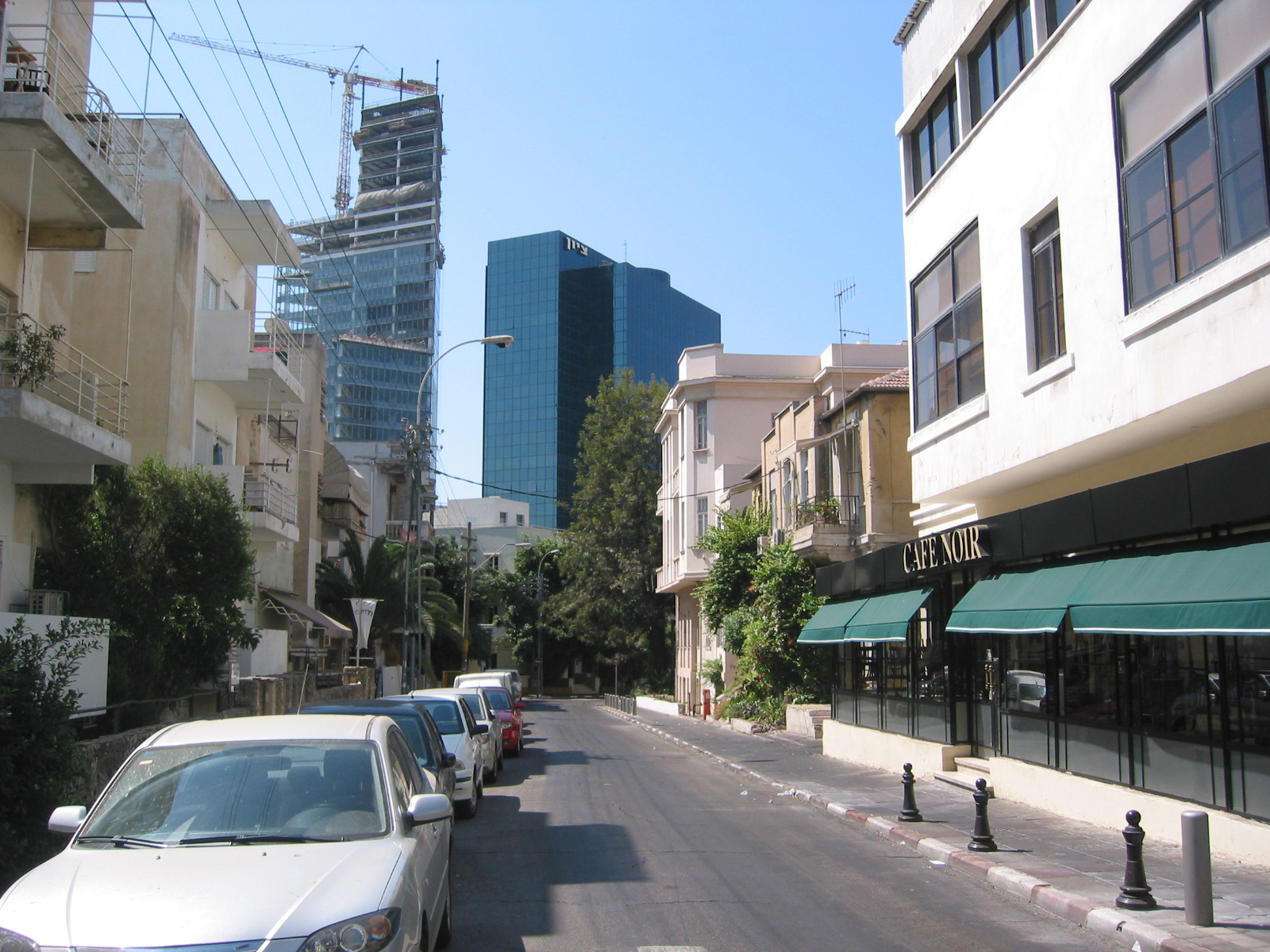 Ehad Haam view